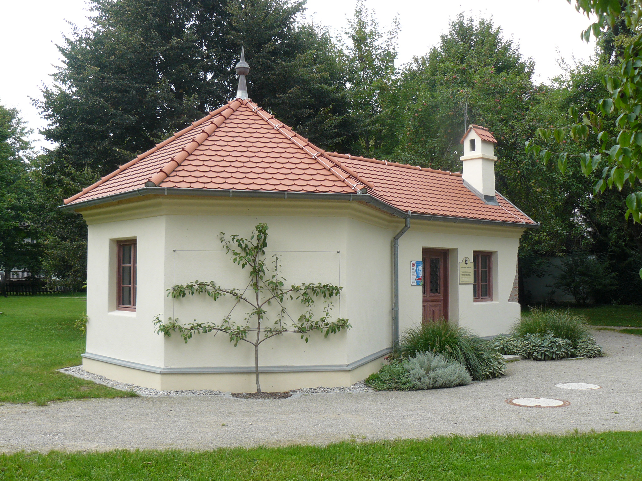 D-7-78-116-6 Badehaeuschen, Bad Woerishofen, Hermann-Aust-Str. 11This is a photograph of an architectural monument.